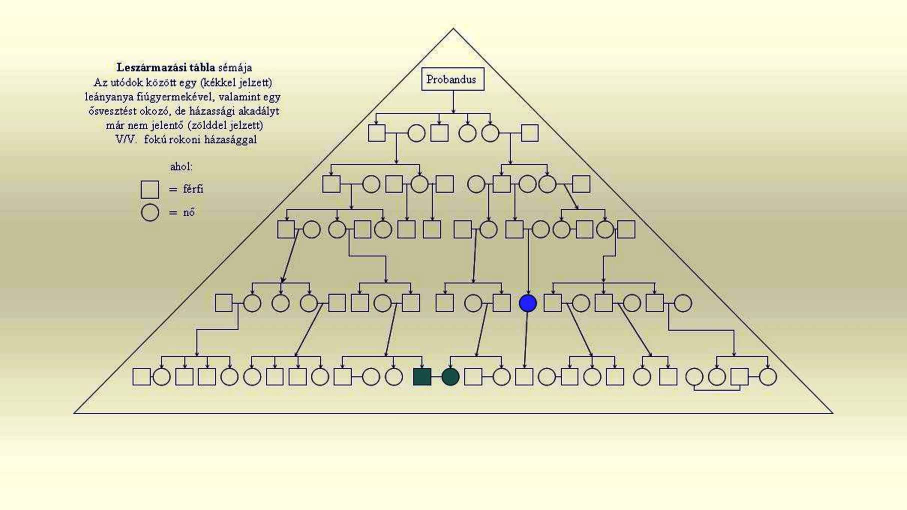 A kép a genealógiából ismert leszármazási tábla sémáját ábrázolja. Illusztráció a Wikipédia "Családfakutatás" szócikkhez.